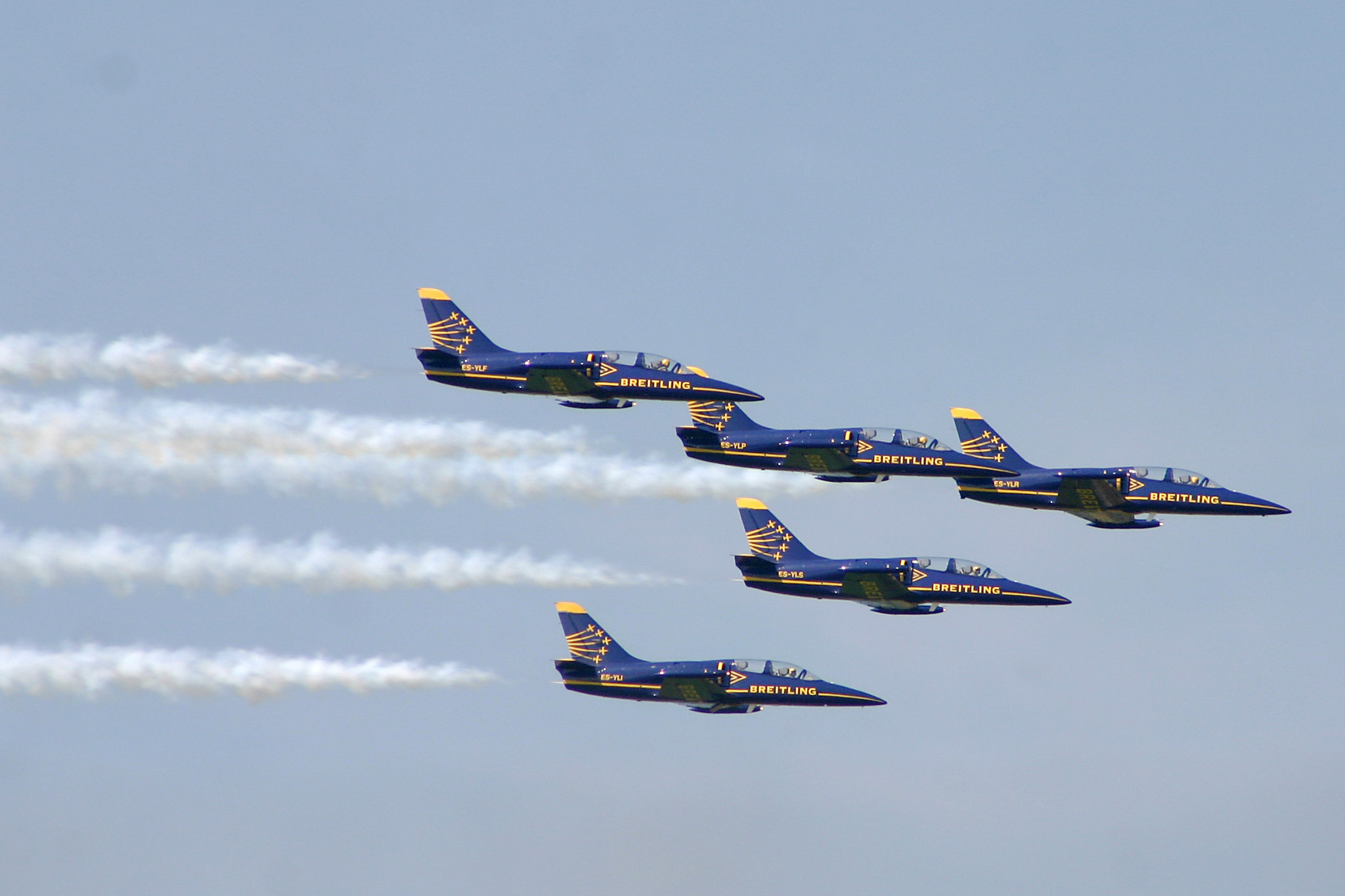 Breitling Jet Team at Air 04, Payerne, Switzerland